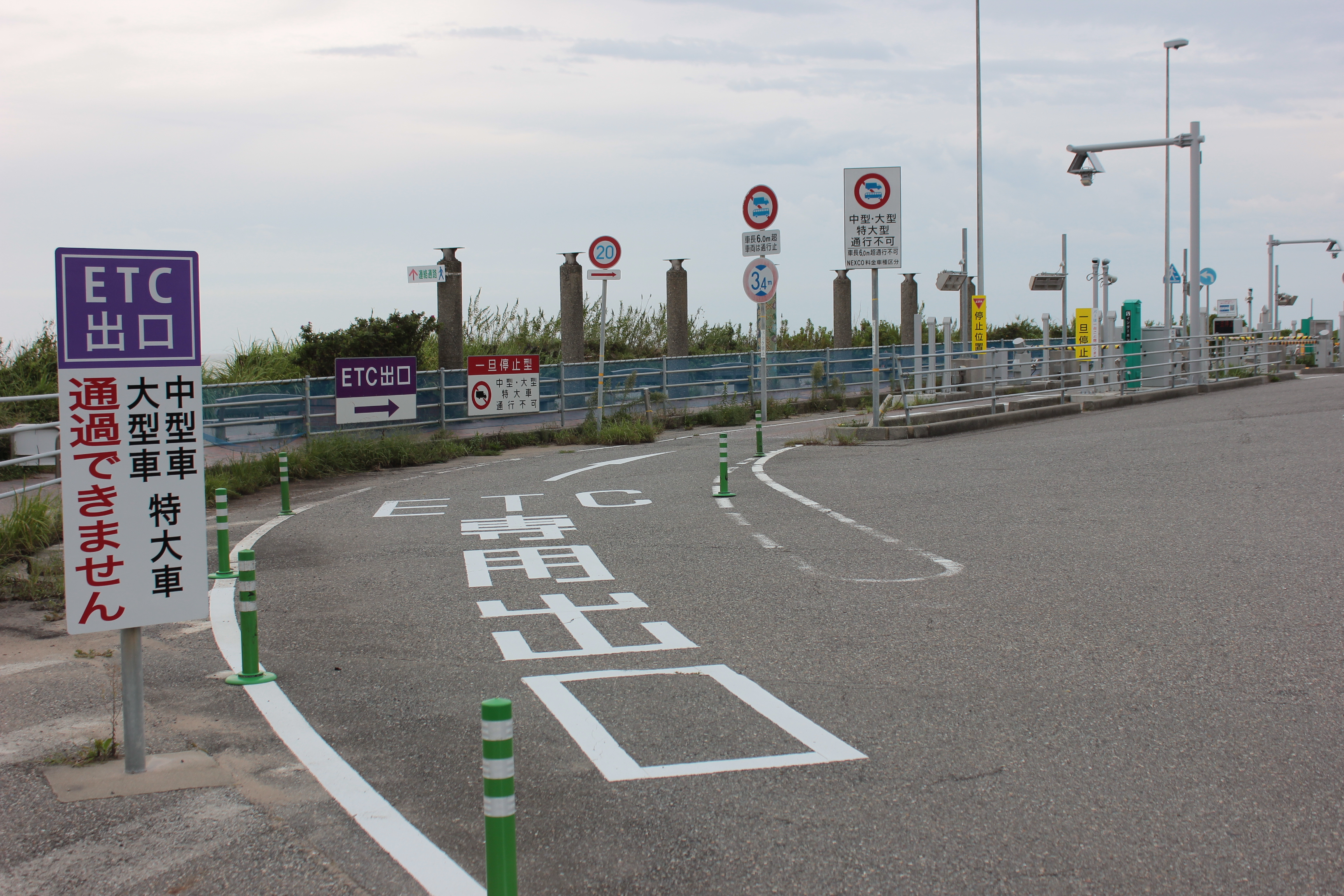 徳光パーキングエリアに併設しているスマートインターチェンジ（下り出口）。大型車は通過できない表示が掲示されている。 Canon EOS Kiss X5